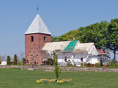 Skivholme Kirke Skivholme sogn - ligger i Framlev Herred - Århus Amt, Denmark.